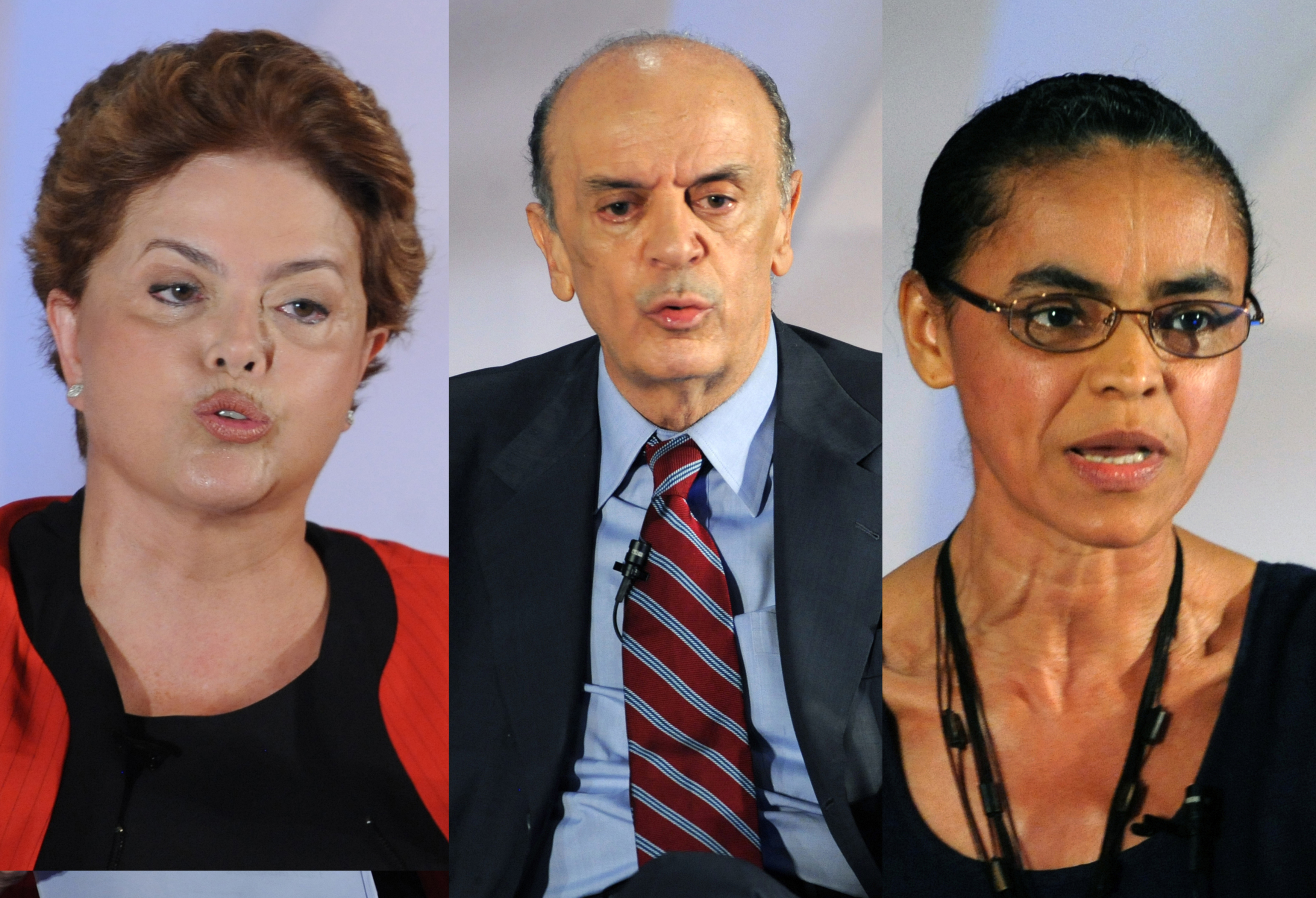 Pré-candidatos na 13ª Marcha dos Prefeitos a Brasília, a Confederação Nacional dos Municípios realiza debate com os mesmos à Presidência.